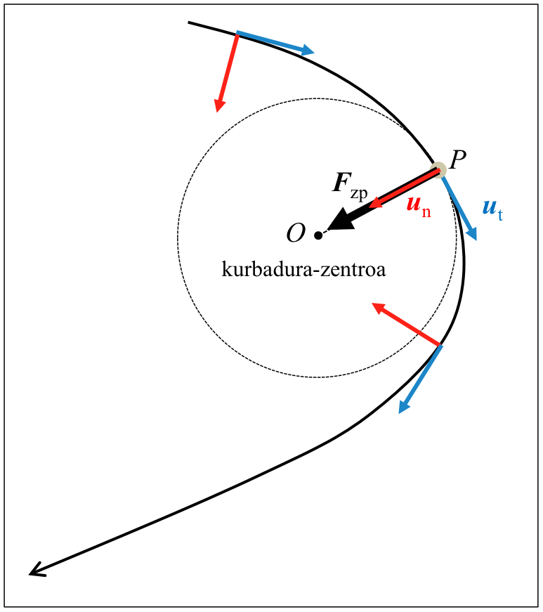 Ibilbide kurbatu bateko P puntuari dagozkion kurbadura-zentroa, bektore unitario tangentea eta bektore unitario normala adierazten diruen eskema